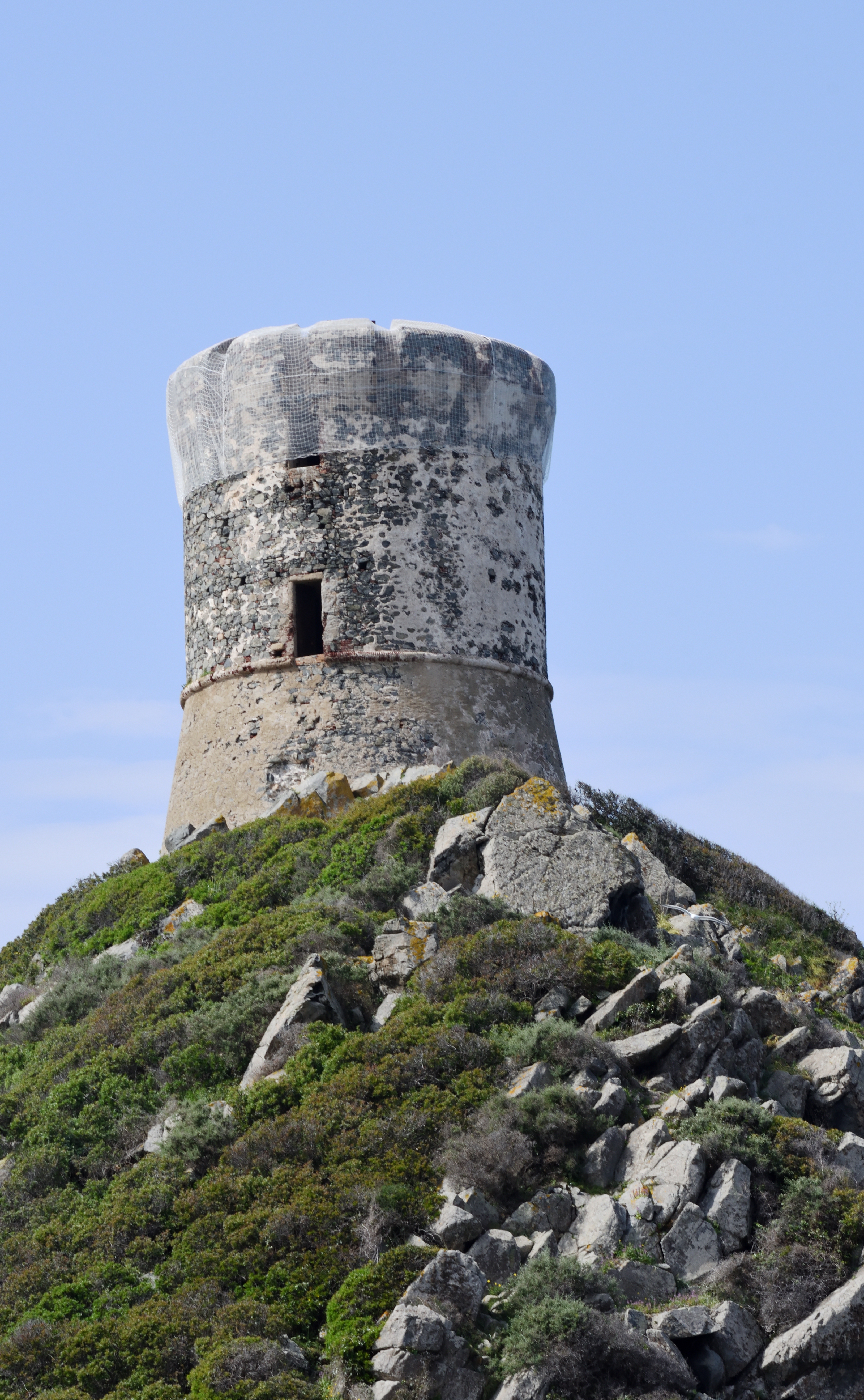 Tour de la Parata à l`entrée du golfe d`Ajaccio